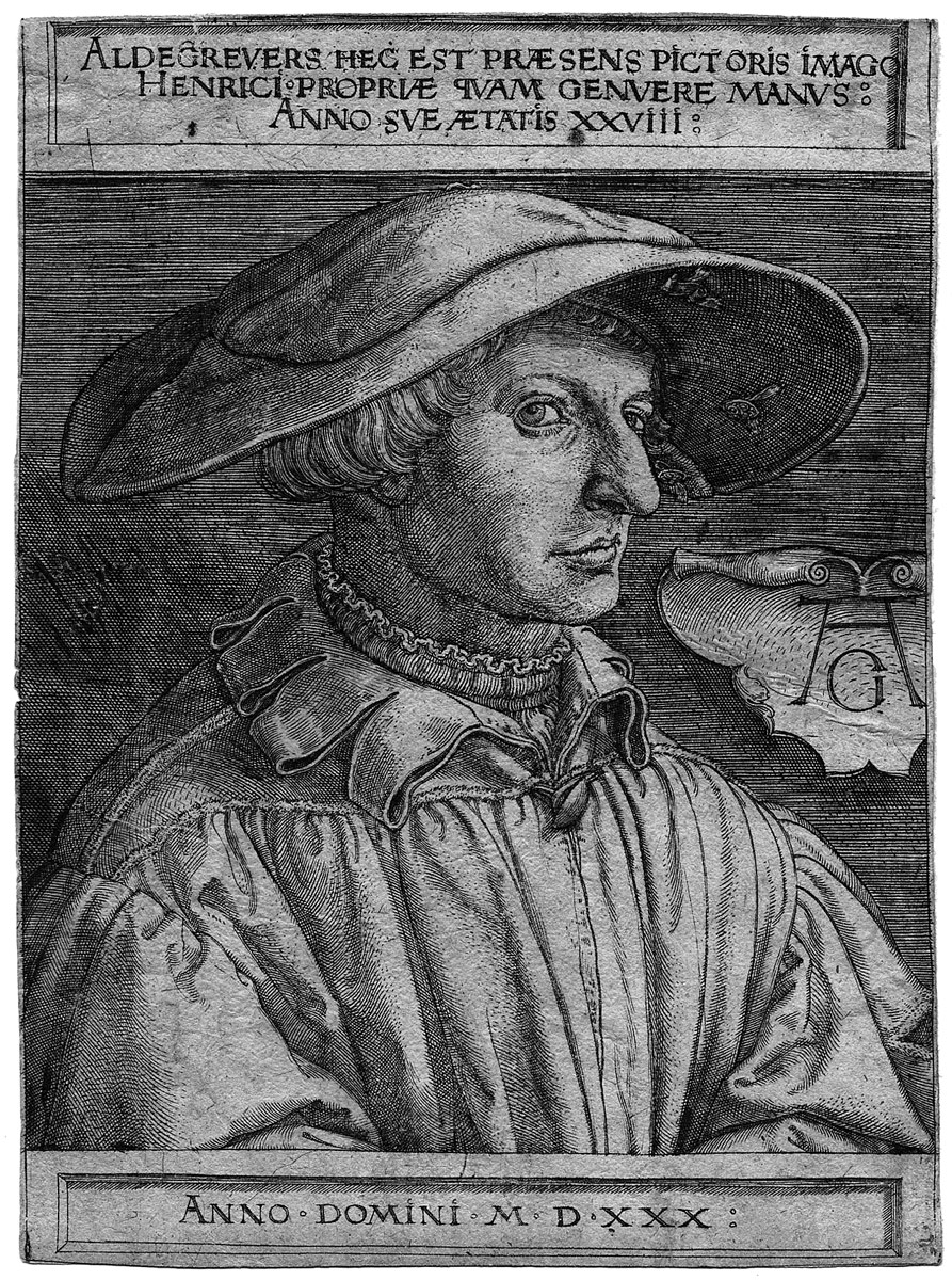 Selbstbildnis mit 28 Jahren. Kupferstich.